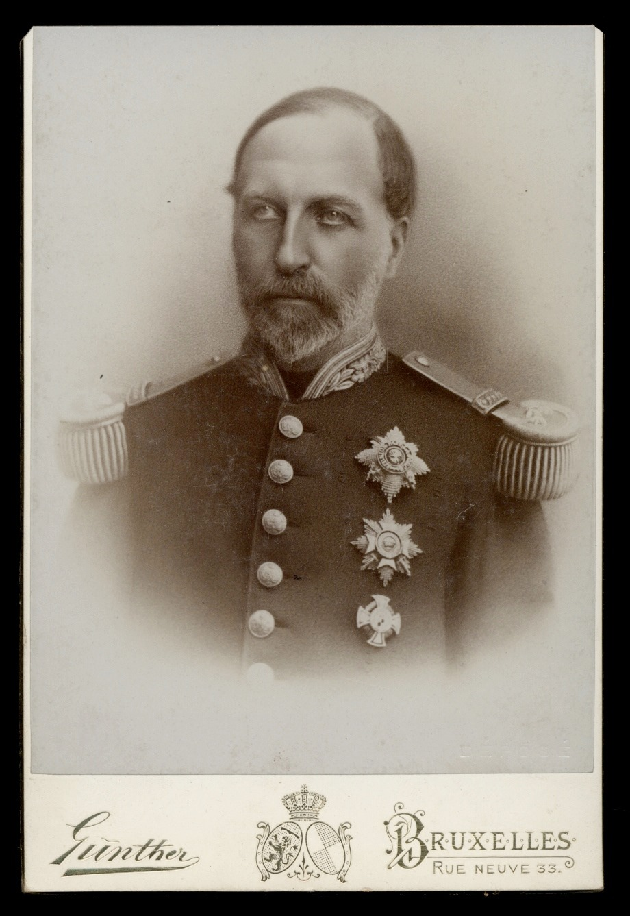 Filips van België - foto uit midden 19e eeuw